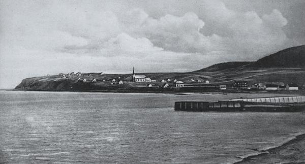 Carte postale représentant le village de L'Anse-au-Griffon avec, au centre, l'église. À l'avant plan, on y aperçoit le quai. - Début 20e siècle. Référence obligatoire: Musée de la Gaspésie. P173 Collection Marcel Guité.